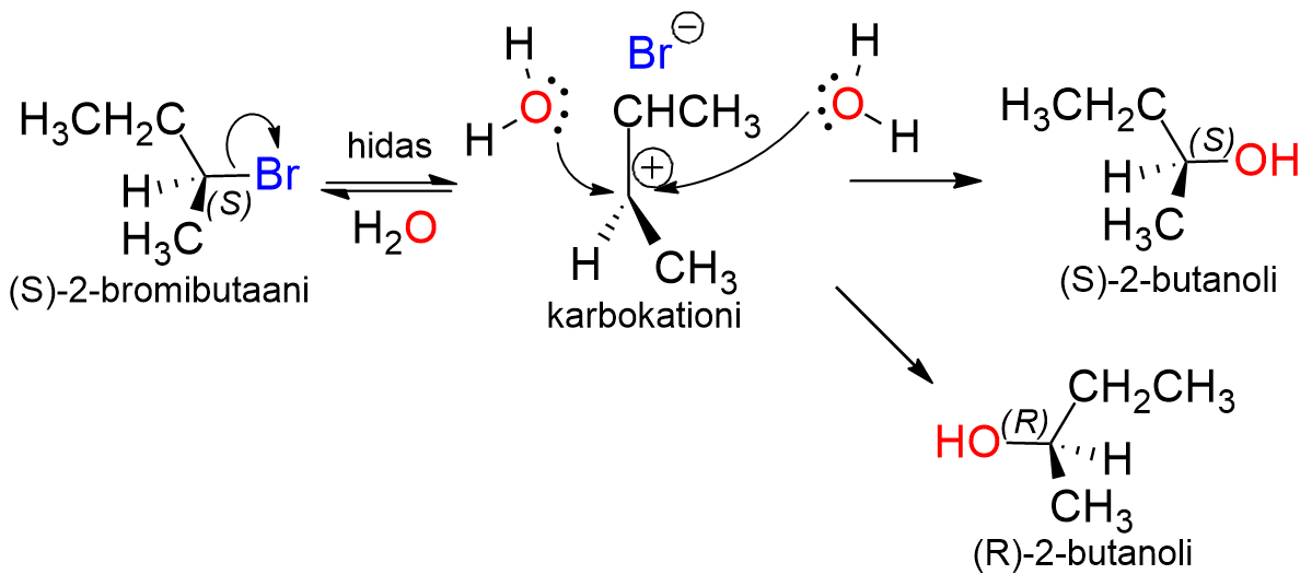 SN1-reaktion karbokationivälituote on tasomainen, jolloin nukleofiili voi liittyä karbokationiin kummaltakin puolelta ja reaktiossa syntyy kumpaakin stereoisomeeria yhtä paljon. Kun (R)-2-bromibutaania hydrolysoidaan, saadaan (R)- ja (S)-2-butanolin raseeminen seos